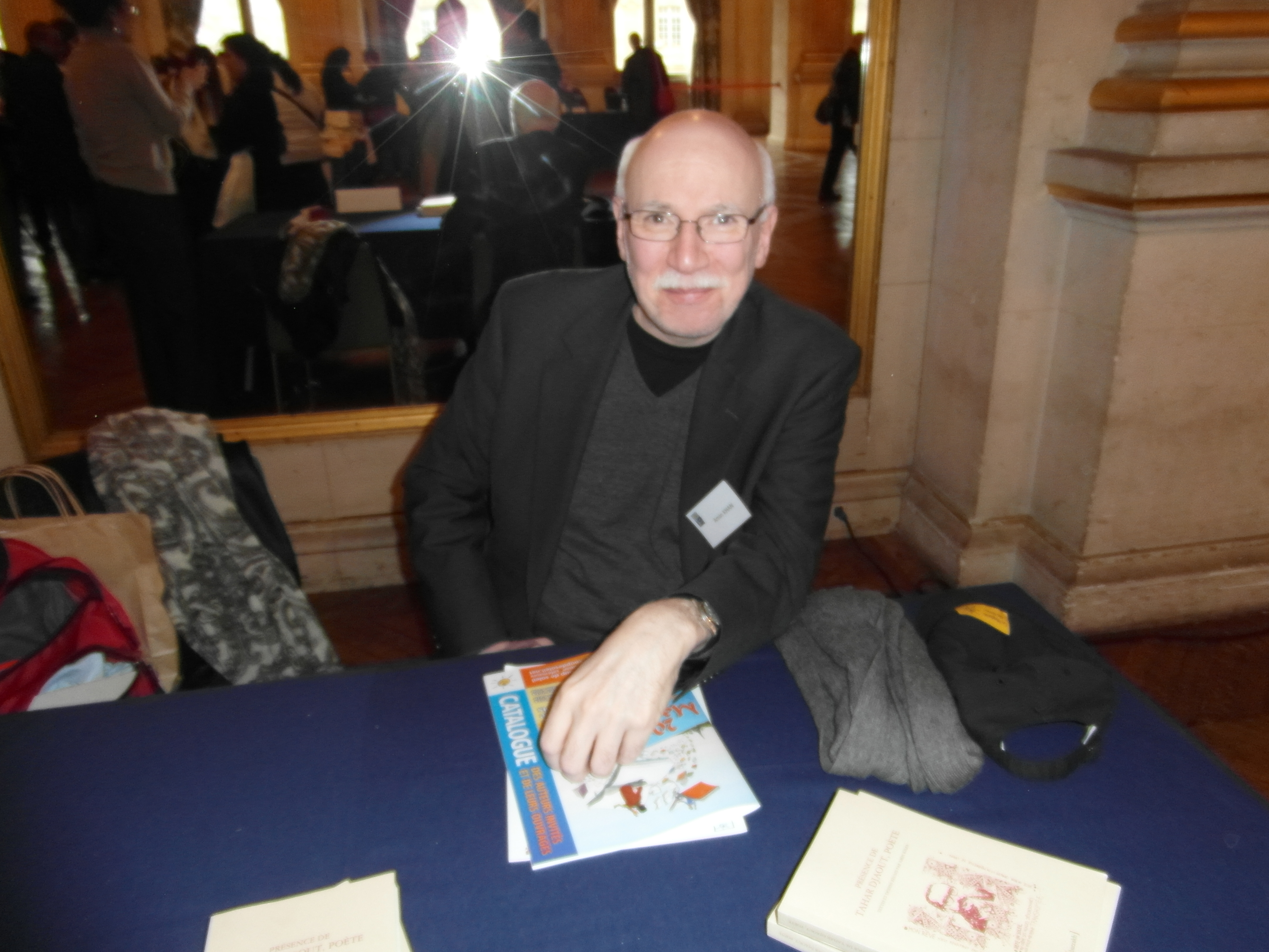 20e Maghreb des Livres, Paris, 8 février 2014